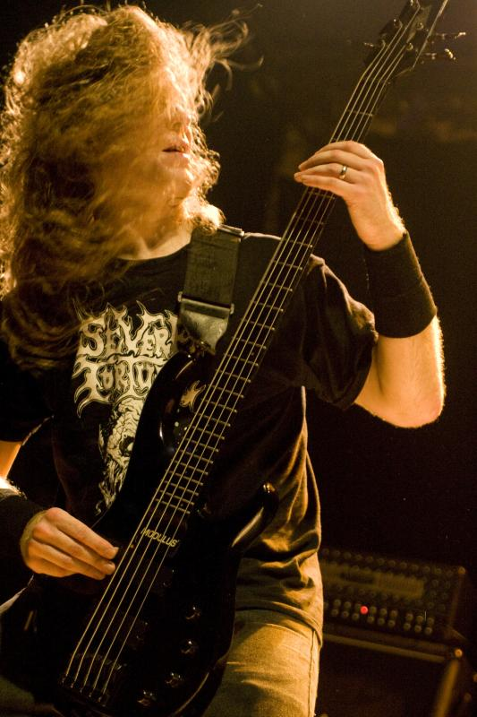 Alex Webster of Cannibal Corpse Live @ Santana Hall - 21/02/2010 - São Paulo, Brasil É proibida a cópia ou reprodução deste material sem a autorização do autor. Por favor, não publique nada daqui sem o devido crédito. Fotógrafo: Alexandre Cardoso